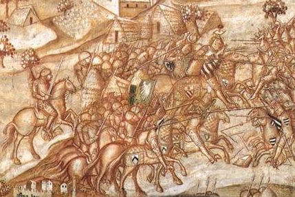 detail: Ugo dell' Ala (Hugo von Melchingen)